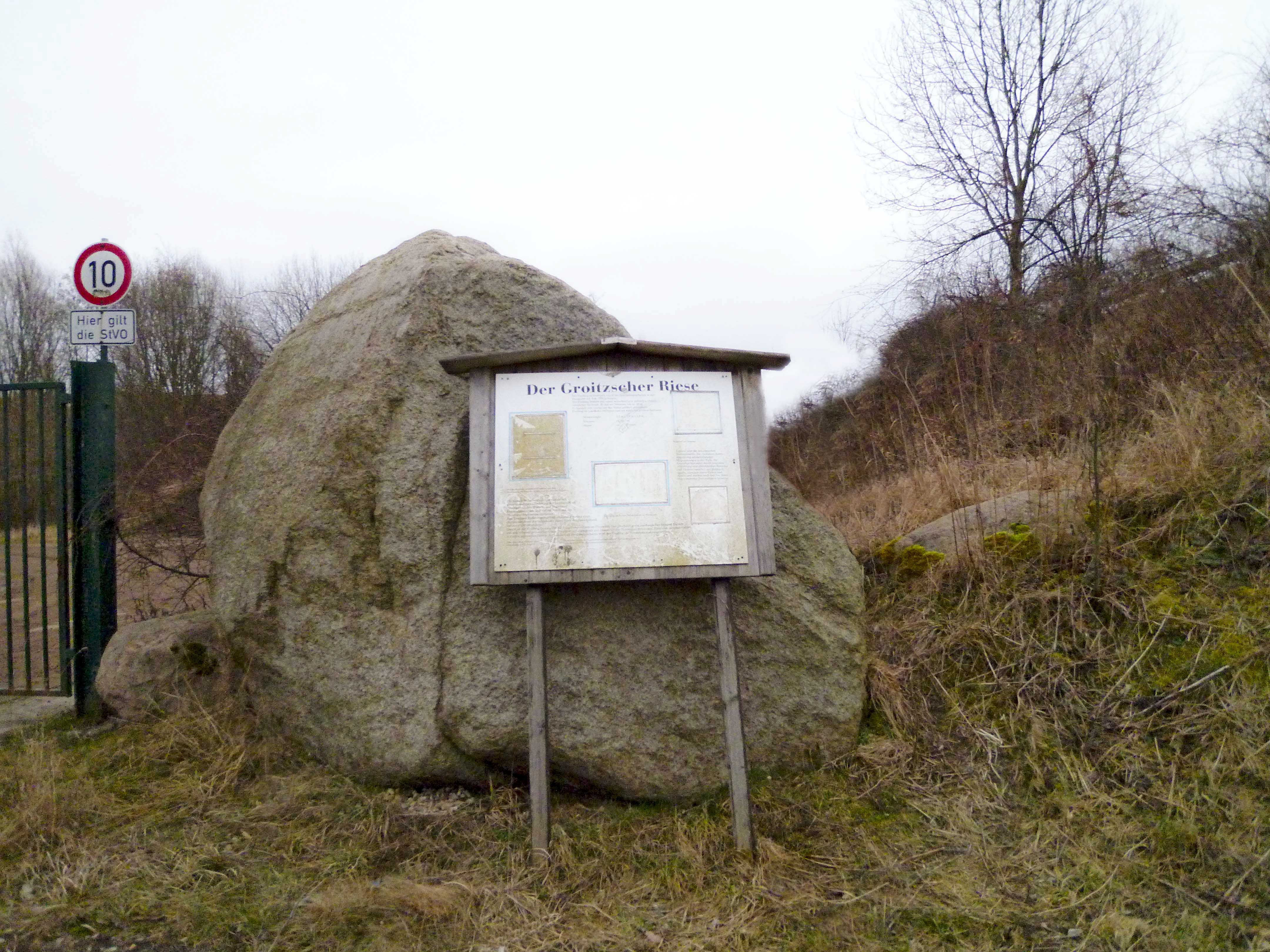 Findling "Der Groitzscher Riese"